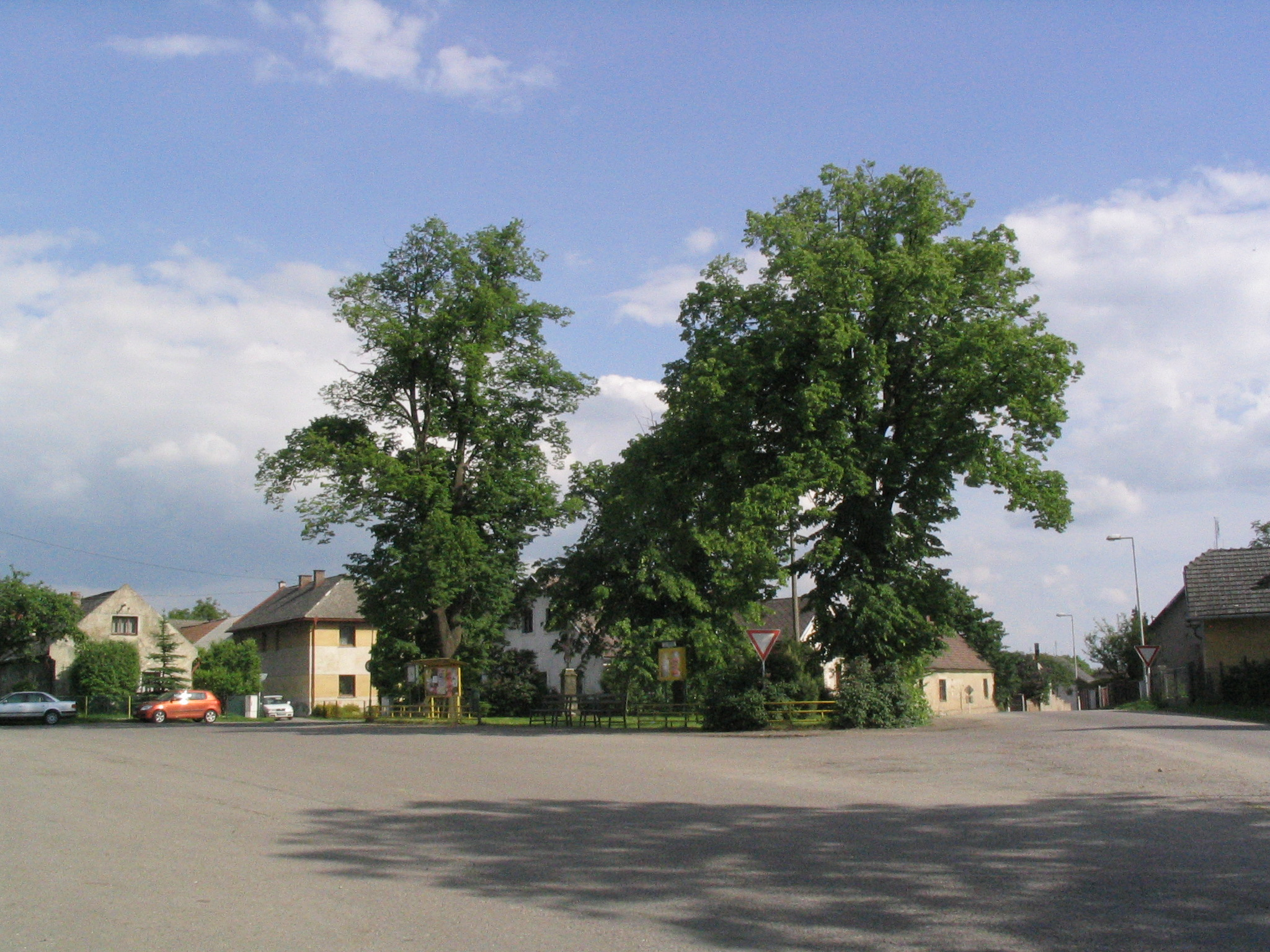 village of Jivina, okres Mlada Boleslav, Czech Republic